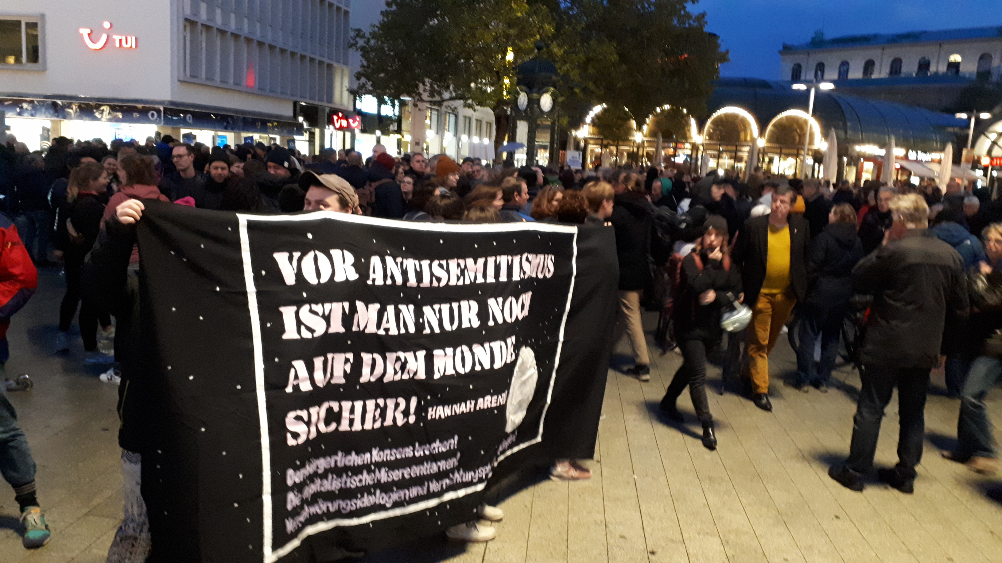 Hannover: Mahnwache gegen Antisemitismus nach Anschlag in Halle